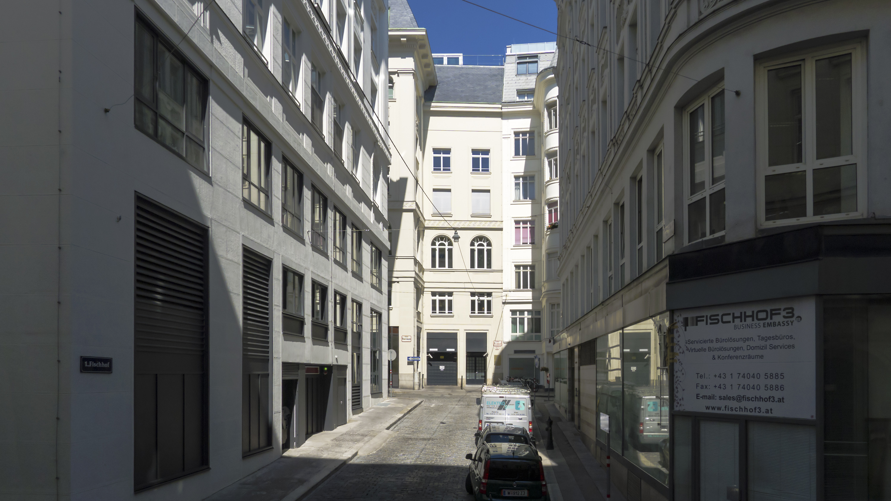 Fischhof in Wien 1 bei der Rotgasse Richtung Nordwesten